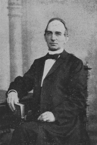 Hornjoserbsce: Portret Korle Awgusta Fiedlerja (1835–1917); serbski wučer, pěsnjer a hudźbnik a kulturny prócowar.